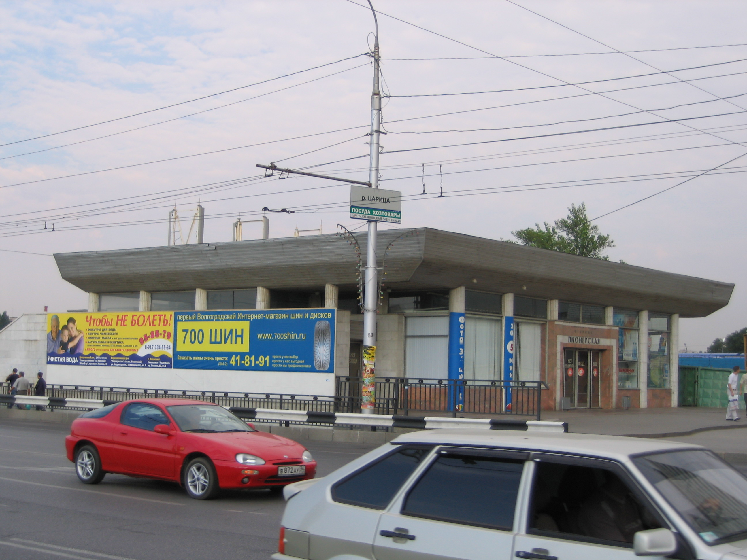 Пионерская (станция метротрама), вестибюль Наземный вестибюль станции Волгоградского метротрама "Пионерская", вид с противоположной стороны моста через пойму реки Царица